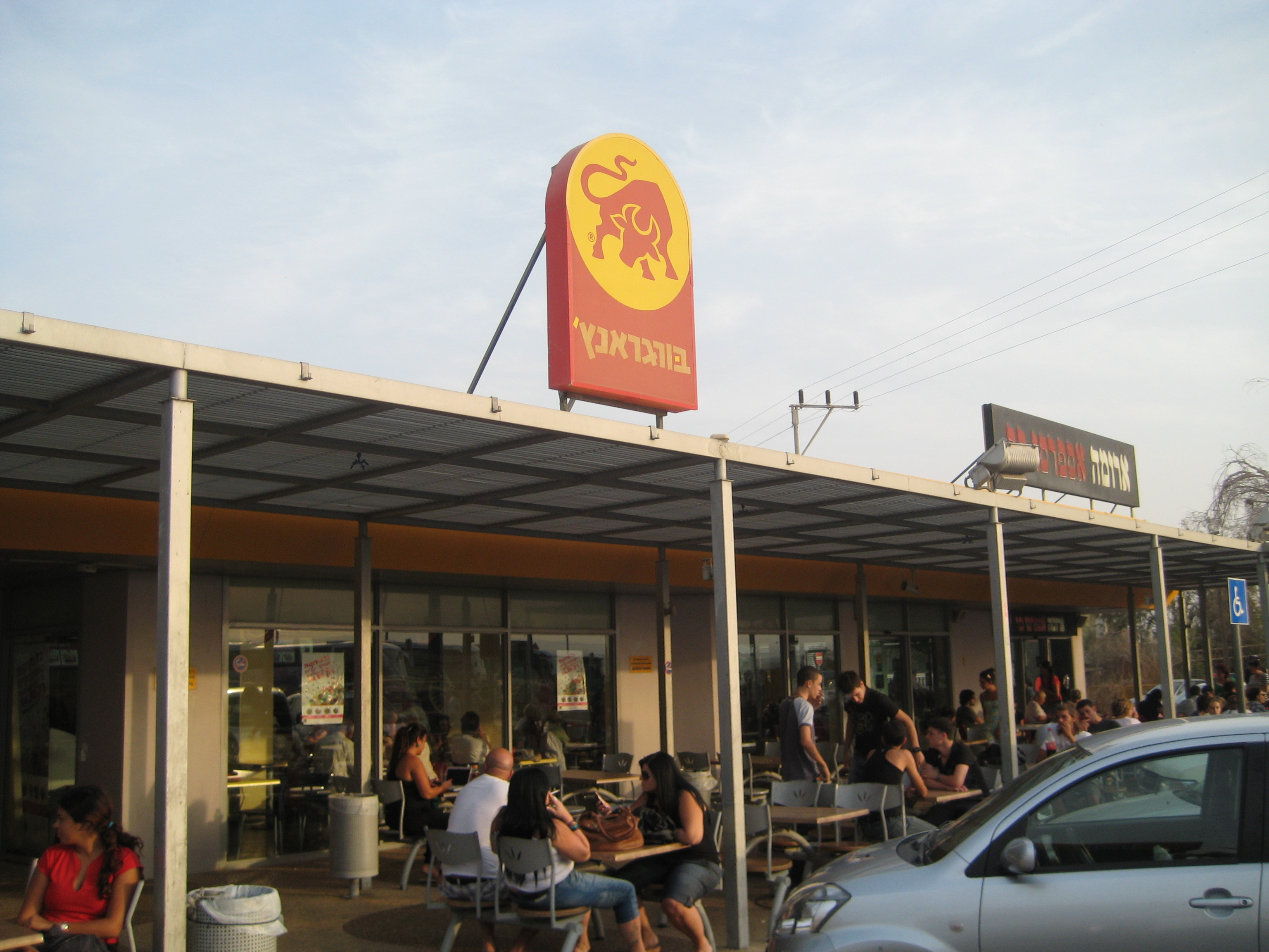 Israel, Ein Hatzeva, My favorite Israeli restaurant branding. Israel